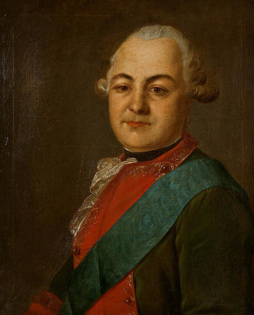 Бибиков, Александр Ильич (1729—1774). Участник Семилетней войны: в сражениях при Цорндорфе и Куннерсдорфе, в осаде Кольберга. Генерал-аншеф, сенатор. Руководил военными действиями против армии Е. И. Пугачева. Покровитель Г. Р. Державина. Маршал «Комиссии по составлению Нового уложения». Составитель «Обряда управления комиссии» и «Наказов» генерал-прокурору и маршалу.